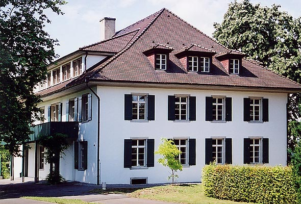 Neuhof in Birr: Herrenhaus (1821) - Stiftung Schweizerisches Pestalozziheim (Juli 2001)